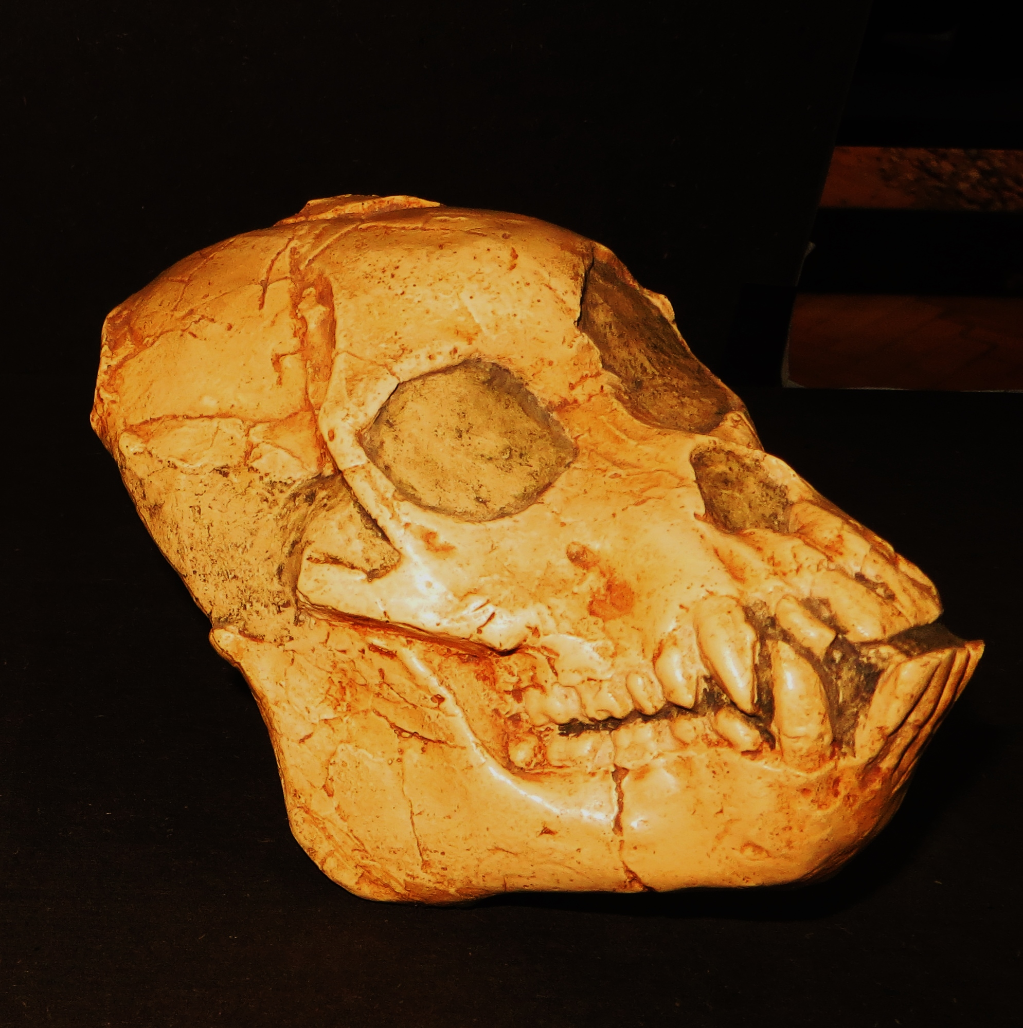 Fossil of Proconsul, an extinct mammal- Took the picture at Museum of Paleontology, Tuebingen